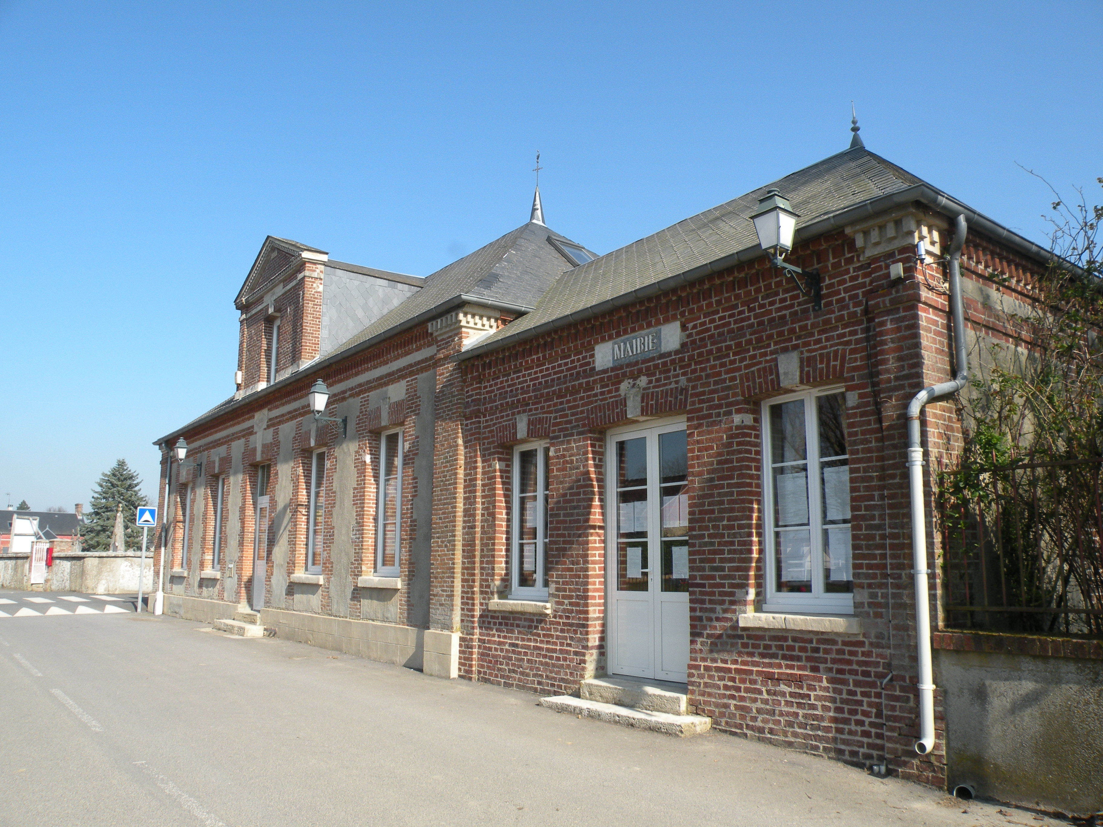 Porcheux mairie